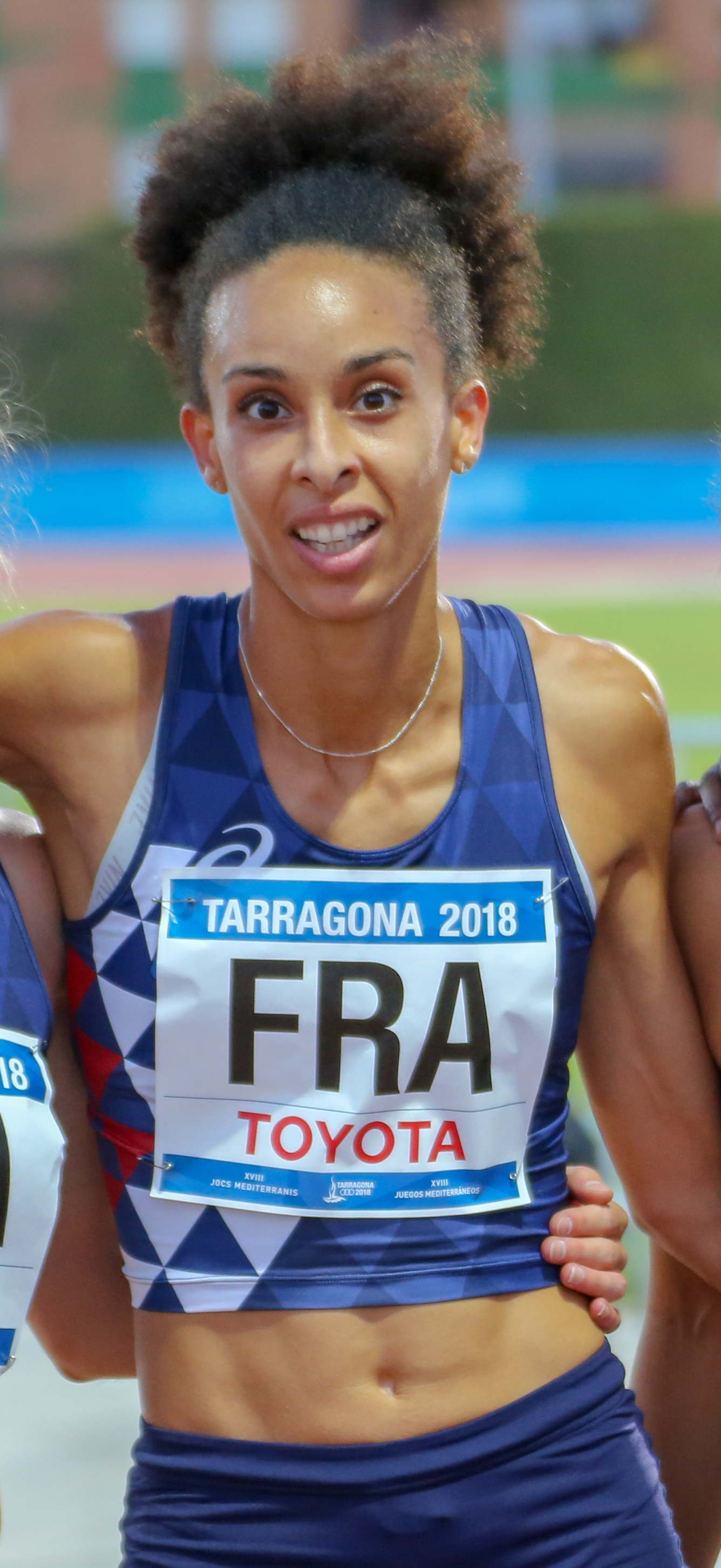 Elea-Mariama Diarra en los relevos 4x400 en los Juegos del Mediterráneo 2018